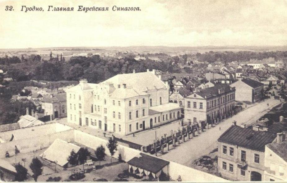 Фотаздымак пач. ХХ ст.